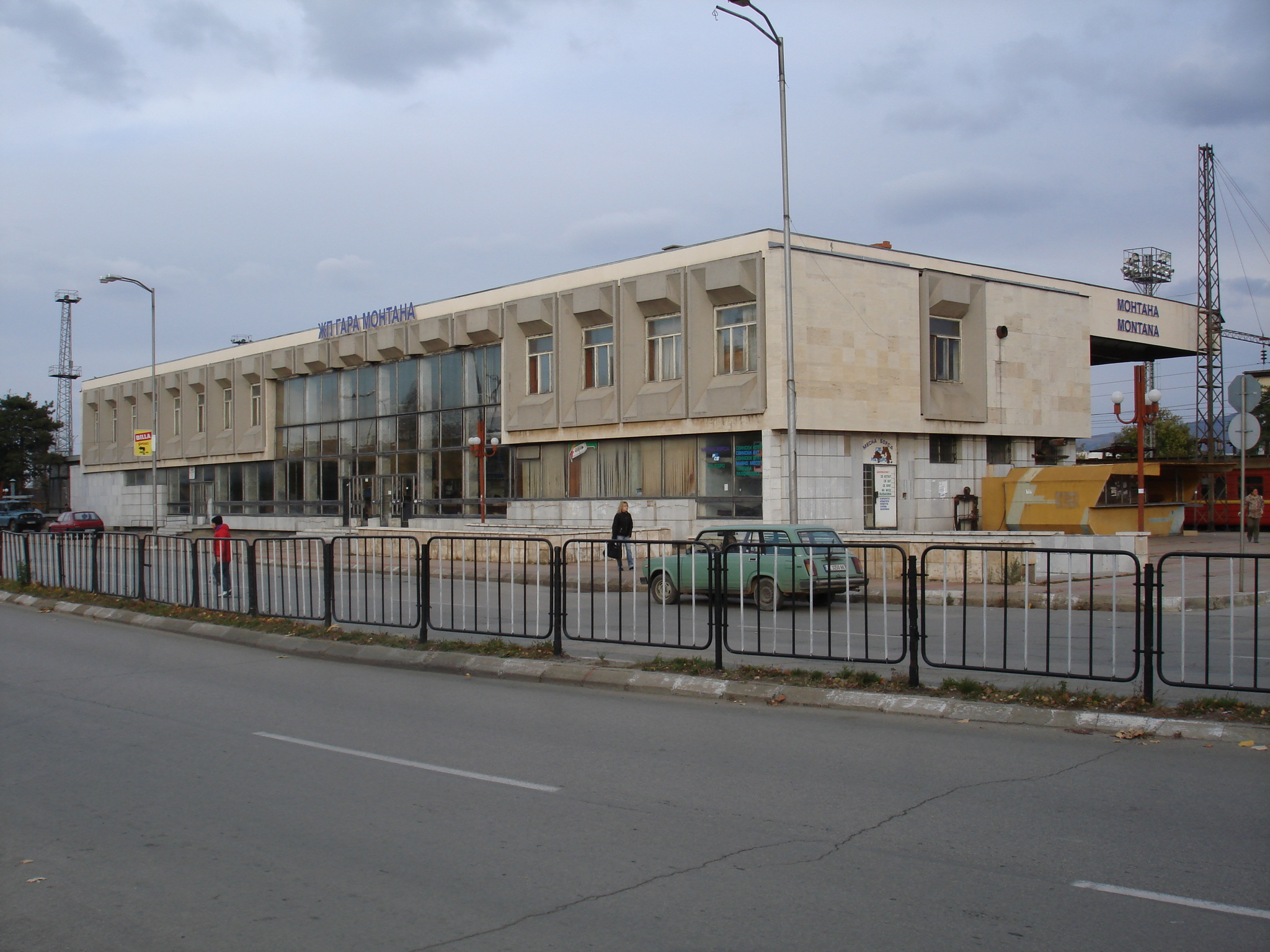 Жп гарата в Монтана